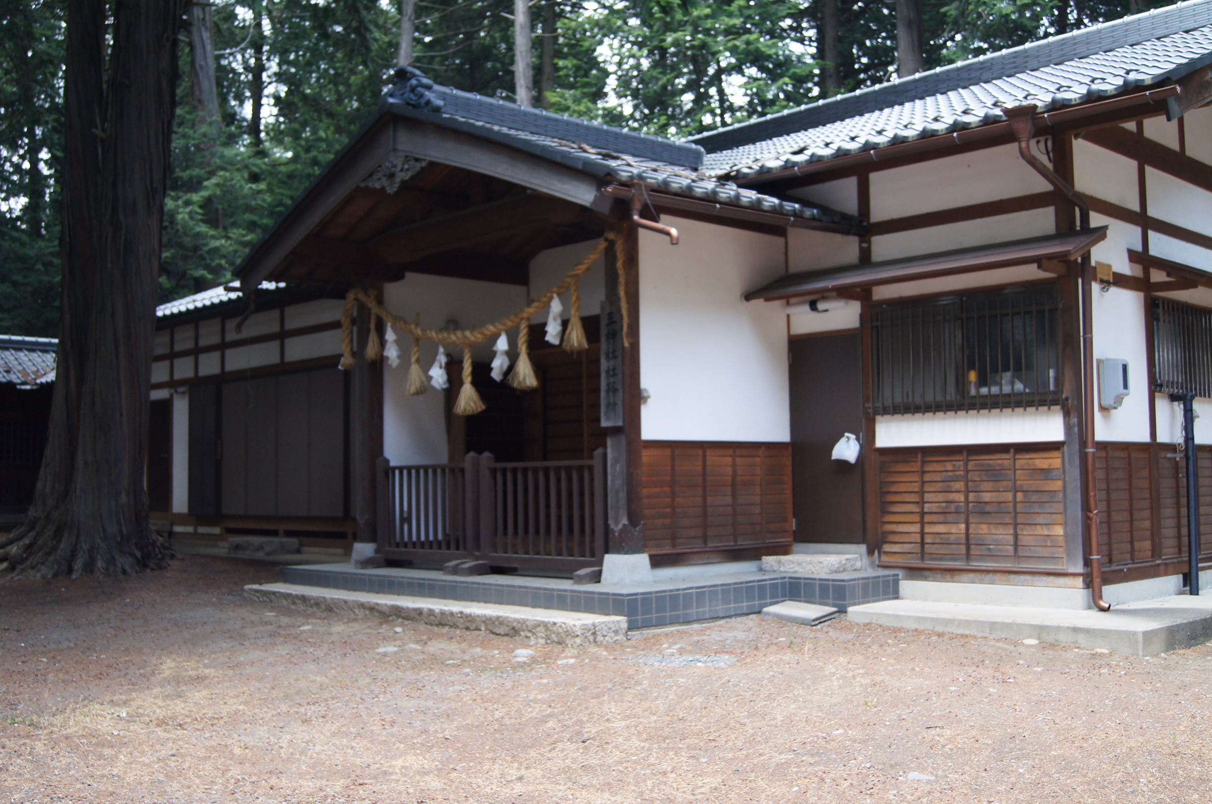 長野県松本市波田森口にある三神社の社務所